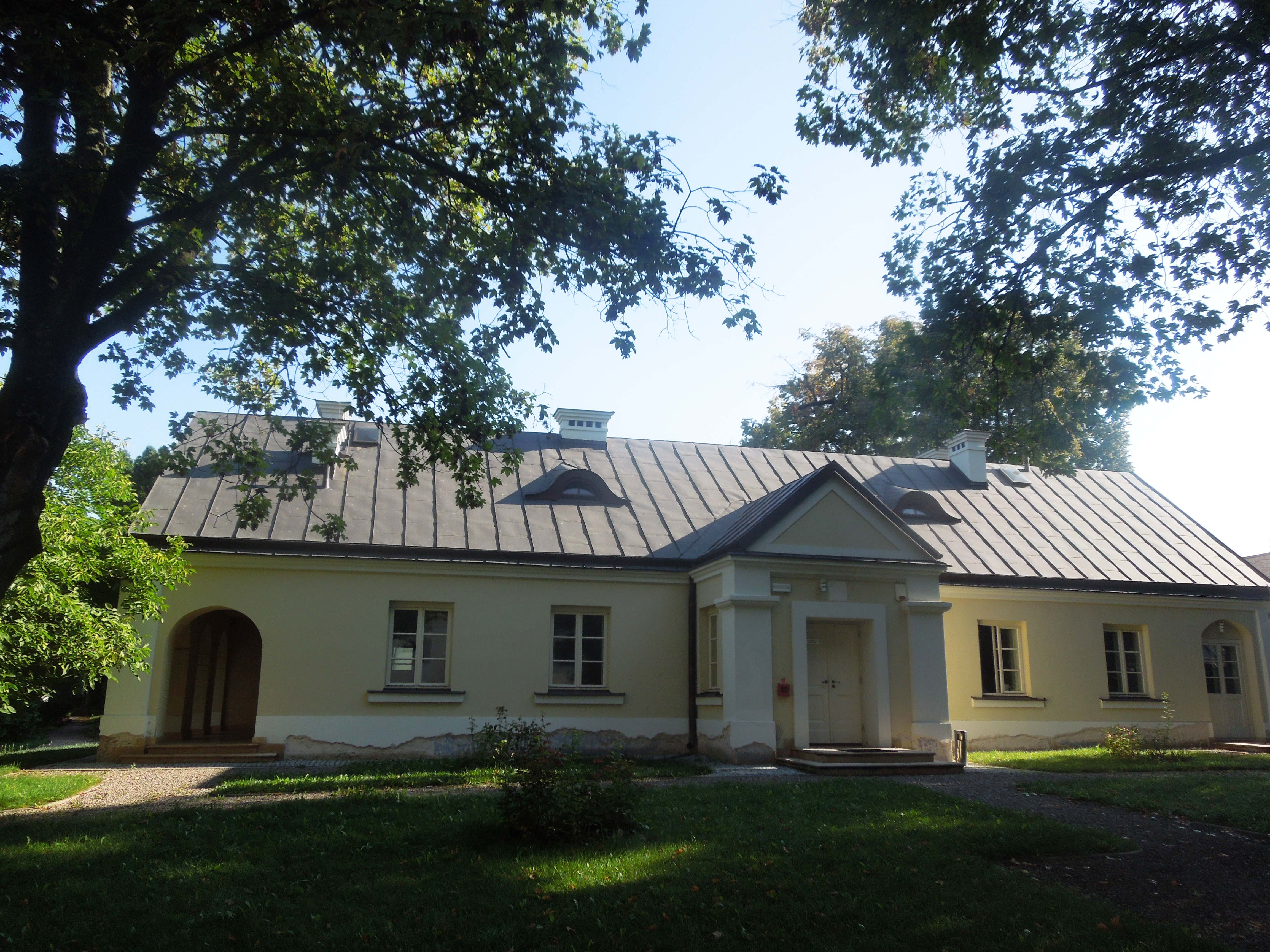 Gardzienice - Oficynka